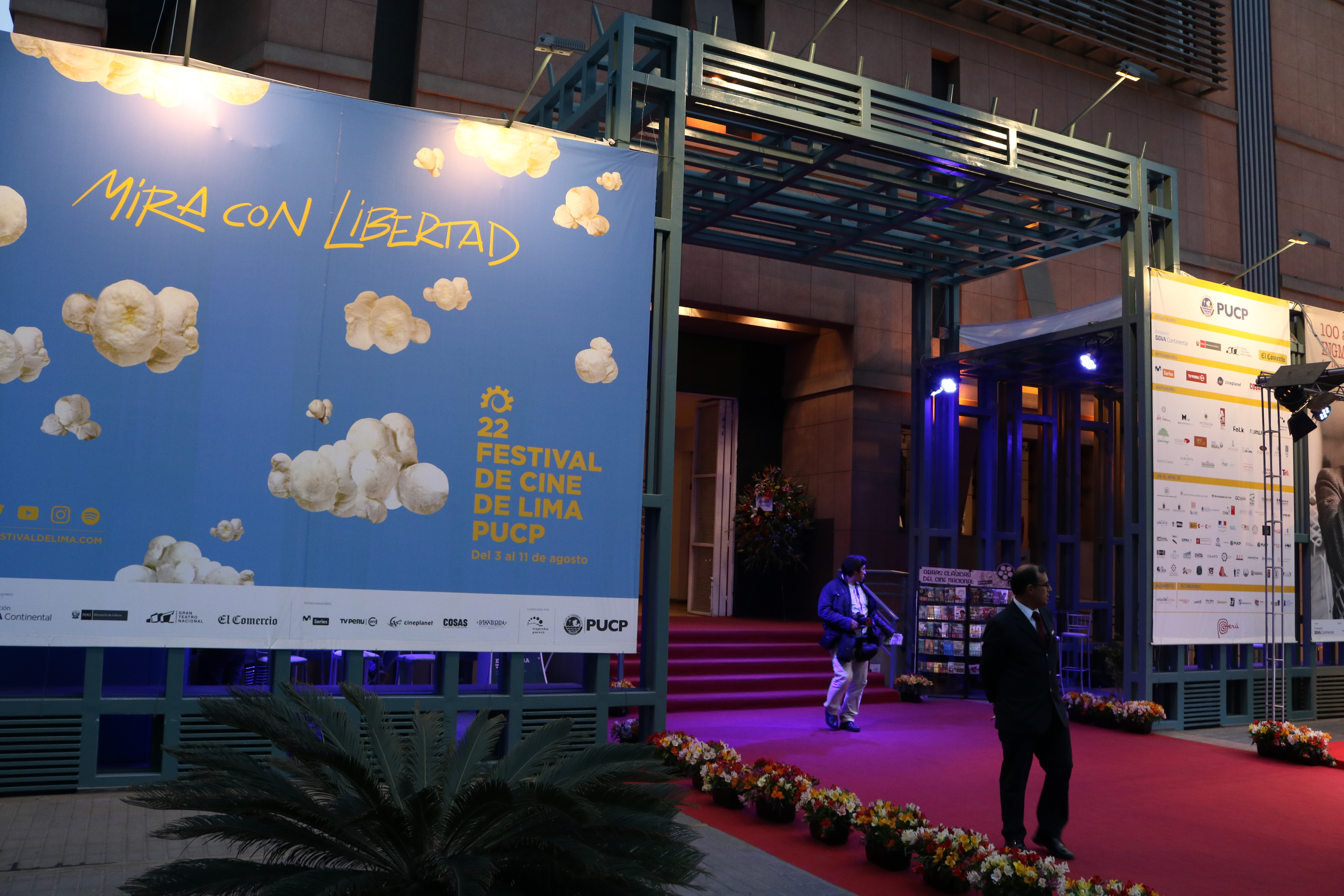 Entrada del Centro Cultural PUCP en San Isidro durante el 22 Festival de Cine de Lima.